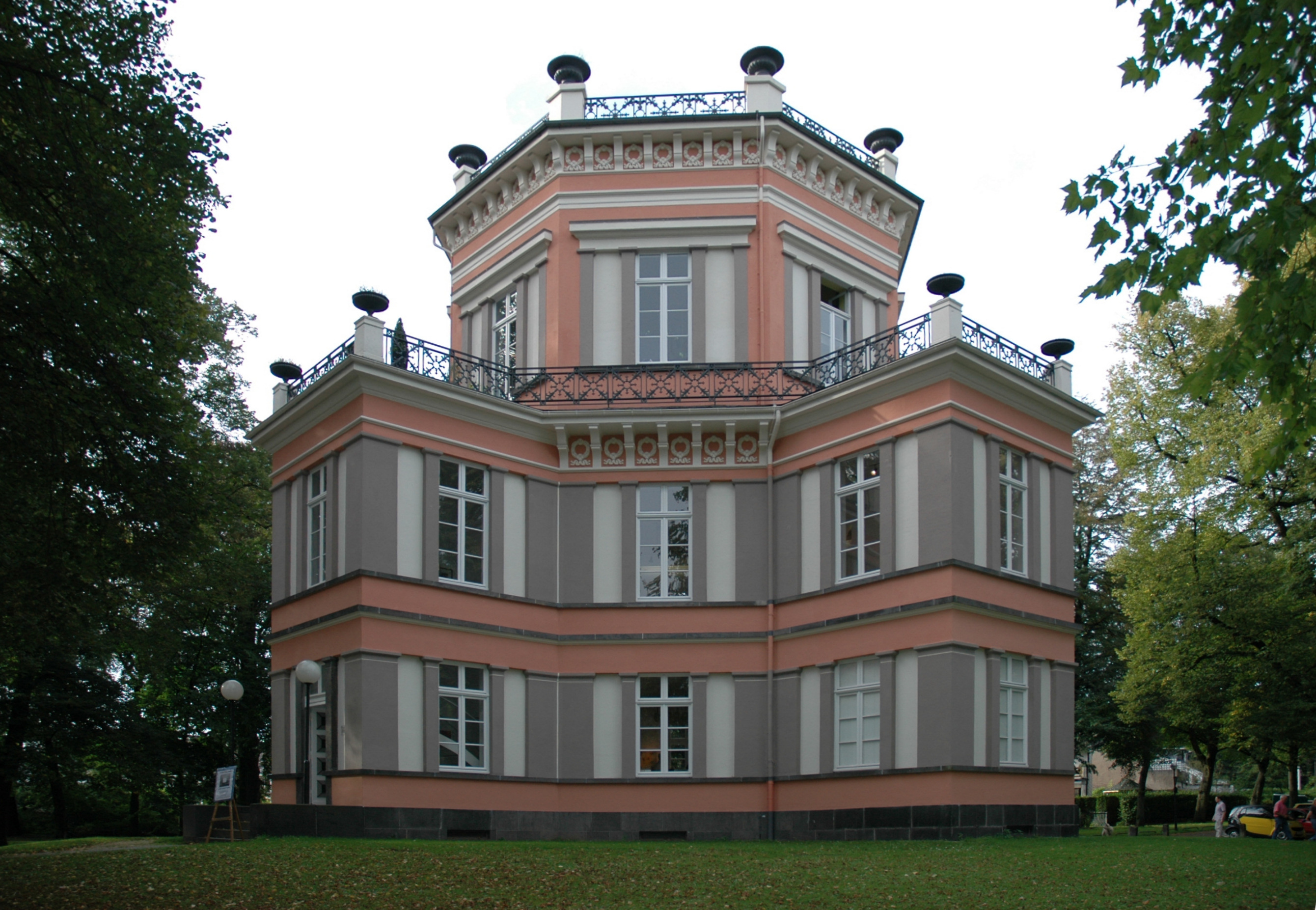 Haus Greiffenhorst in Krefeld-Linn, Greiffenhorst 1, Denkmal Nr. 75 This image shows a heritage building in Germany, located in the North Rhine-Westphalian city Krefeld (no. 75).